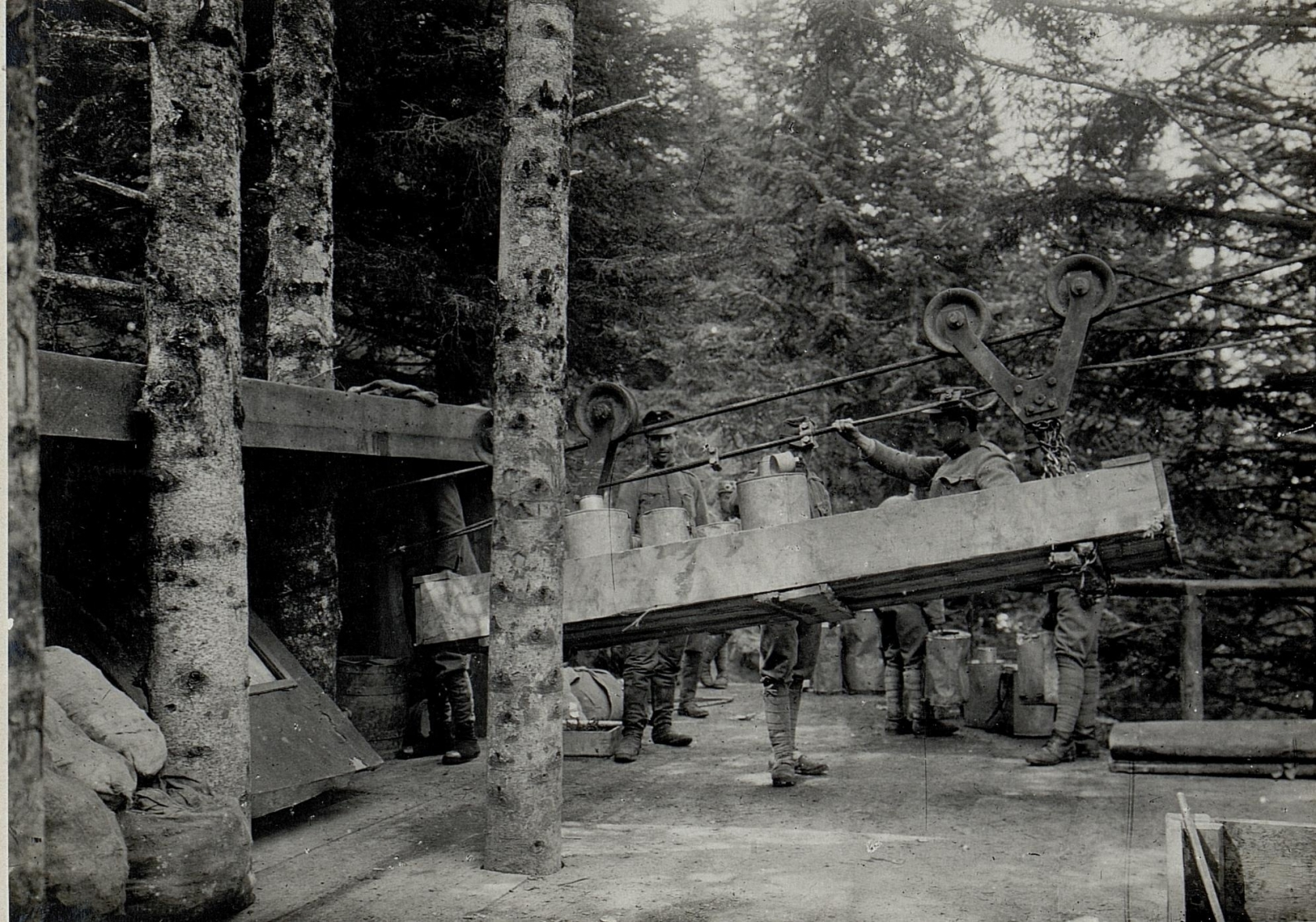 Lavaroneplateau Drahtseilbahnstation Cima di Vezzena. Wagen mit Wasser.